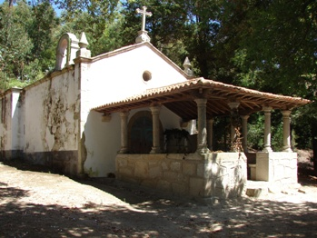 Construção de fins do século XVI (1492), de planta rectangular e frontaria voltada a Oeste. Compõe-se das seguintes partes ou corpos: alpendre corpo central e capela – mor. O alpendre é suportado por oito colunas de fuste liso e capitéis de tipo dórico que, por sua vez, se apoiam sobre um muro de pedra. Adossado ao lado esquerdo da porta de entrada, está um púlpito de pedra de forma circular. Por cima do telhado do alpendre, no corpo central, rasga-se um óculo circular. A fachada remata com plinto decorado de volutas que suporta uma cruz florenciada. Uma sineira, de pedra, pousa no beiral do lado sul do templo. O acesso ao interior faz-se através de um arco de volta inteira, de traça quinhentista, provida de porta de castanho, ao gosto joanino. Lateralmente foram cavados quatro gavetões destinados aos membros da família da Casa de Belinho. O chão é em lajes de granito, tal como é o pavimento do alpendre. A capela-mor está separada do corpo central por um arco de volta inteira. No corpo central da capela-mor está o túmulo de D. Paulo da Cunha Sottomayor, fundador da Casa de Belinho e desta capela.